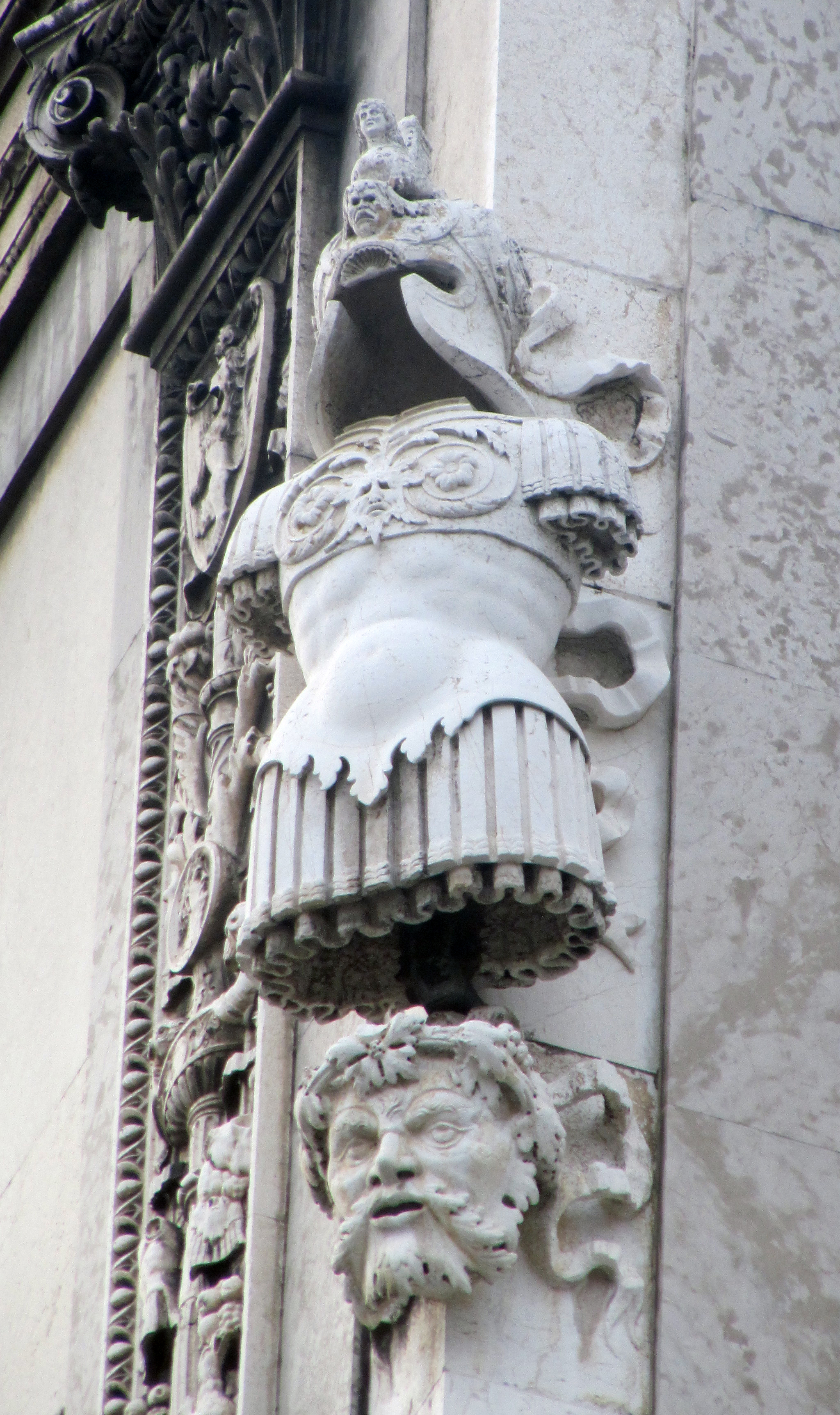 Trofeo - gasparo cairano (palazzo della loggia, brescia)